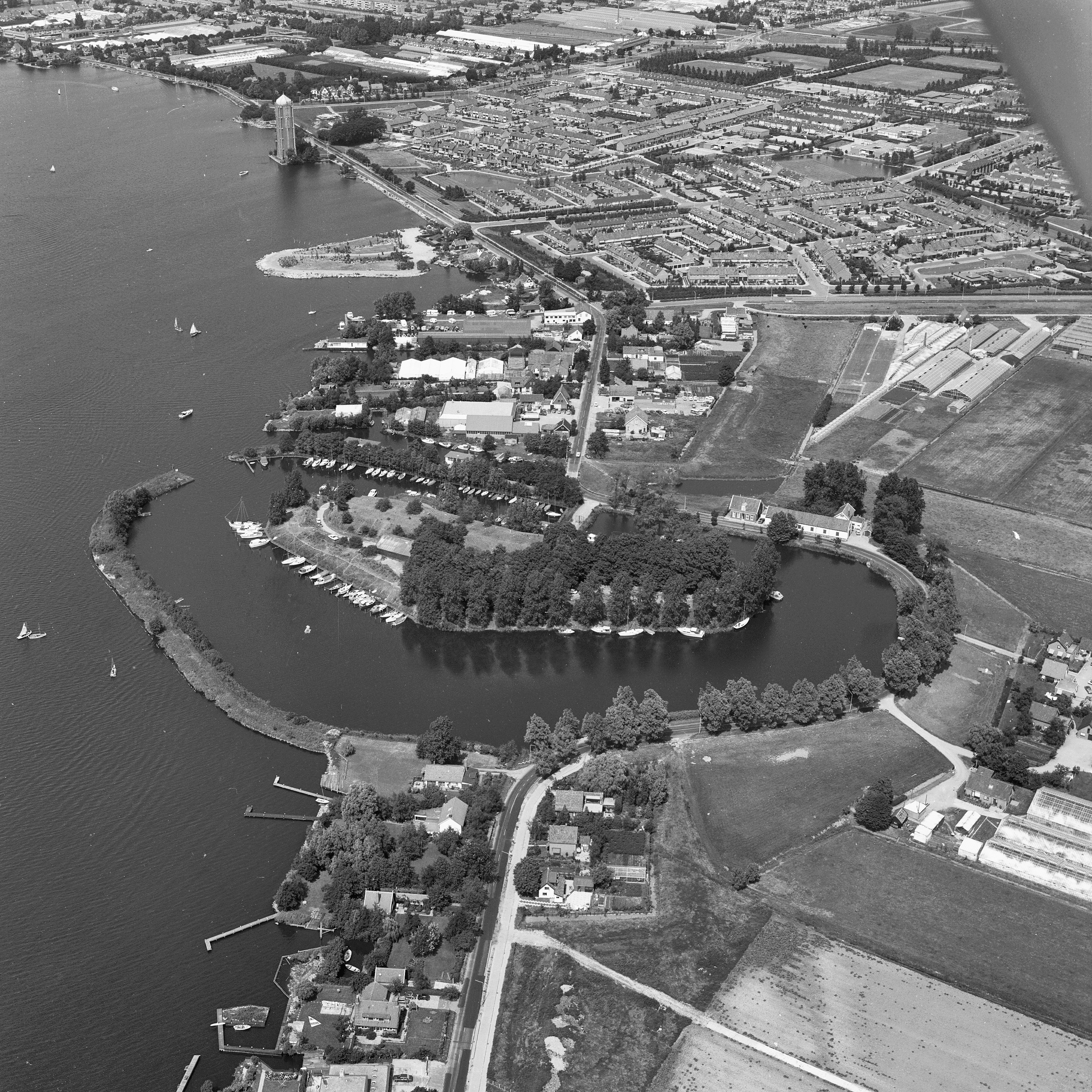 Overzichten: luchtfoto's